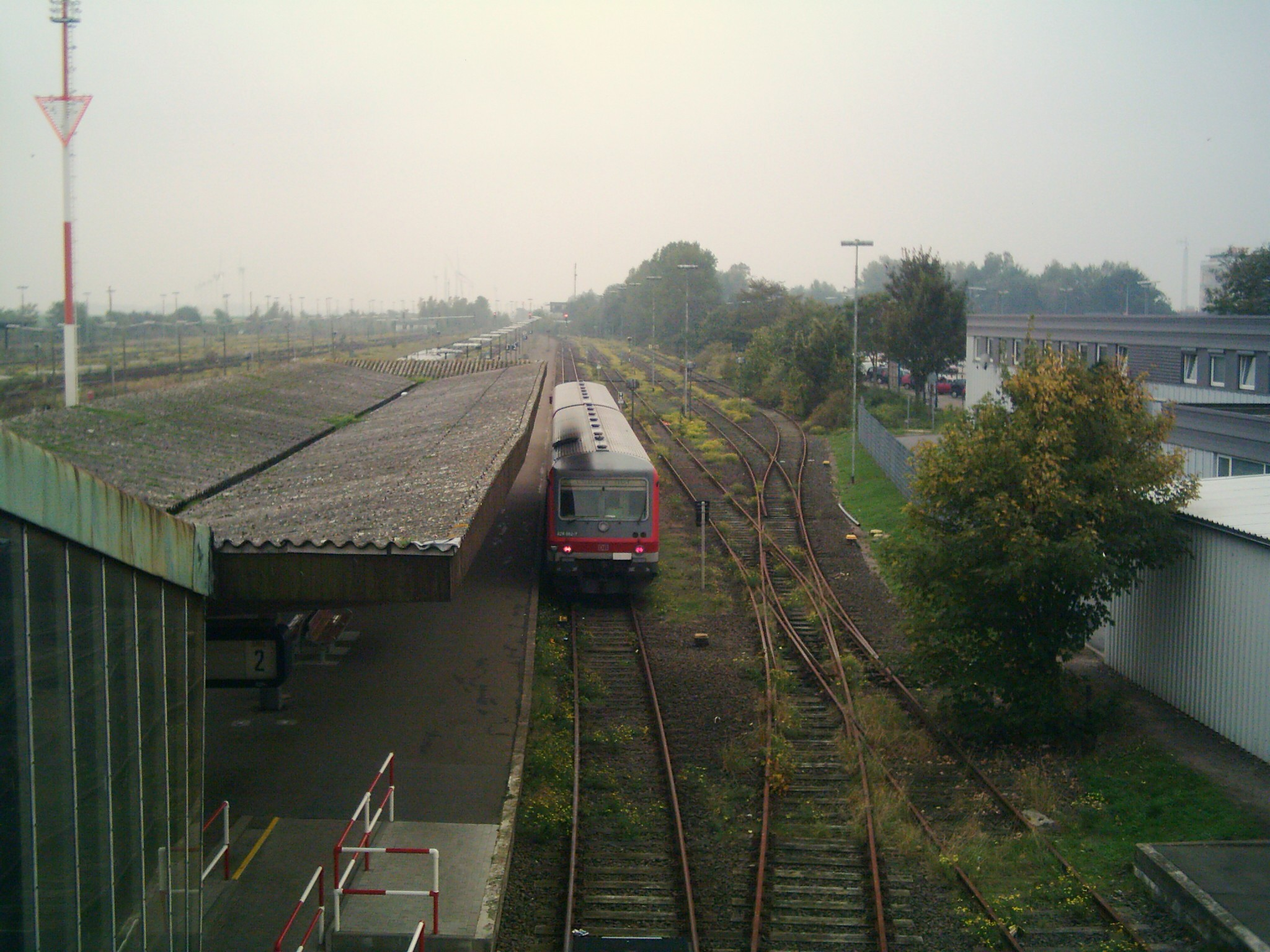 Ein Triebzug der Baureihe 628 im Bahnhof Puttgarden (Fehmarn)